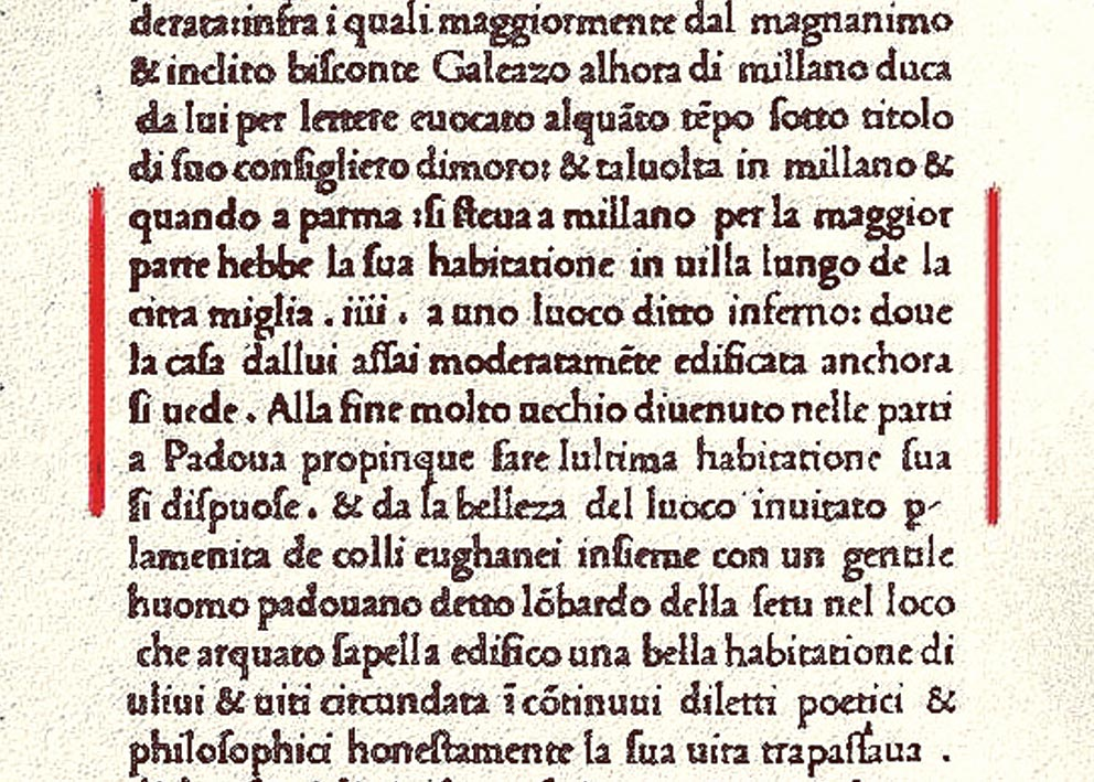 Pagina di un incunabolo conservato nella Biblioteca Trivulziana, stampato per il centenario della morte di Francesco Petrarca, contenente il Canzoniere e i Trionfi (Venezia, [Gabriele di Pietro], 1473), dove nella Vita di Petrarca dello pseudo Antonio da Tempo, ma probabilmente di Pier Candido Decembrio, leggesi il famoso riferimento alla località "Inferno" a quattro miglia da Milano (cfr. Il Fondo Petrarchesco della Biblioteca Trivulziana. Manoscritti ed edizioni a stampa (sec. XIV-XX), a cura di Giancarlo Petrella, Milano, Vita e pensiero, 2006, pp. 56-58, con la bibliografia ulteriore): “si steva a millano per la maggior parte hebbe la sua habitatione in villa lungo de la città miglia IIII a uno luoco ditto inferno: dove la casa dallui assai moderatamente edificata anchora si vede”